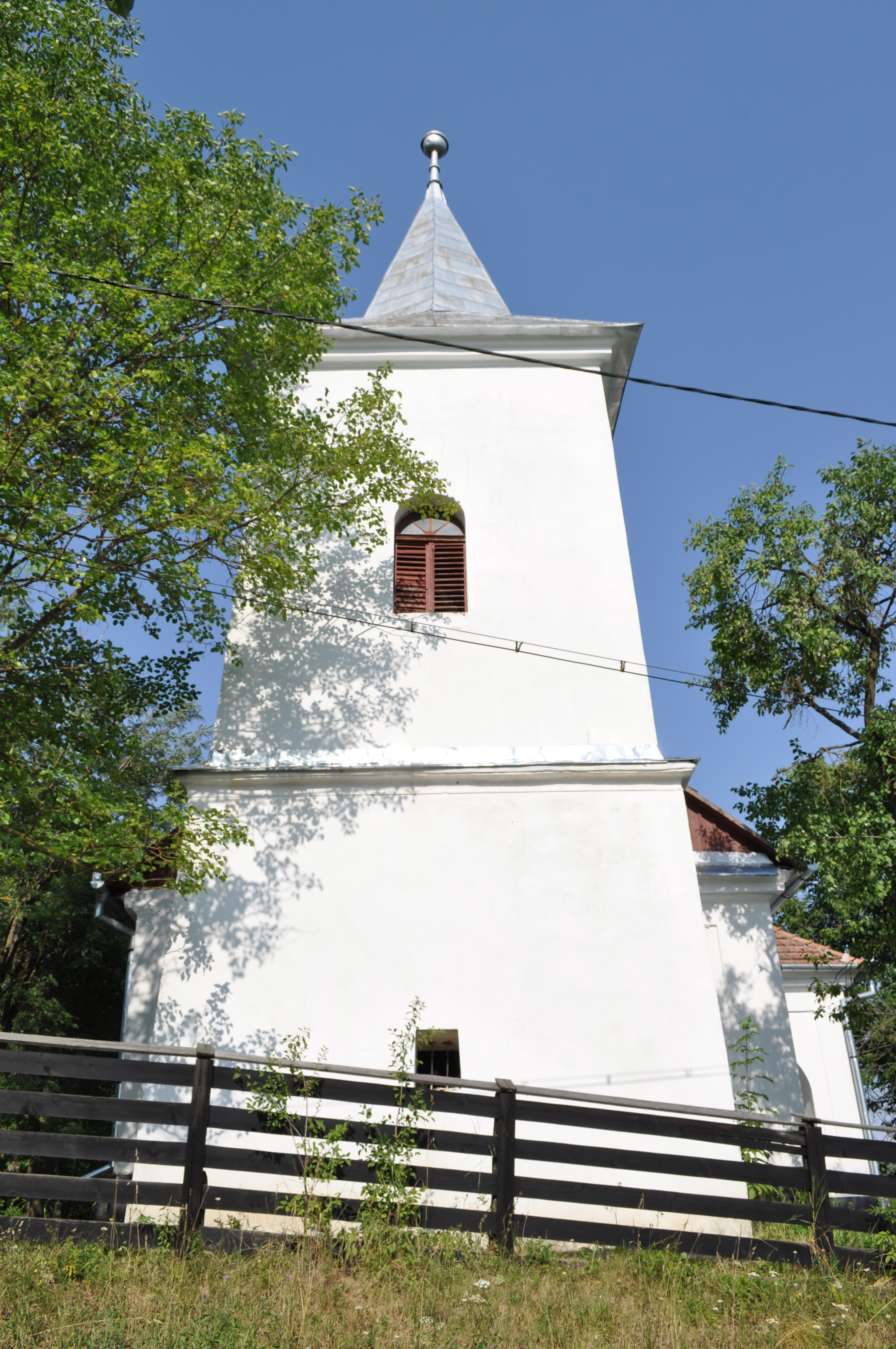 Biserica reformată, sat COMLOD; comuna MILAŞ